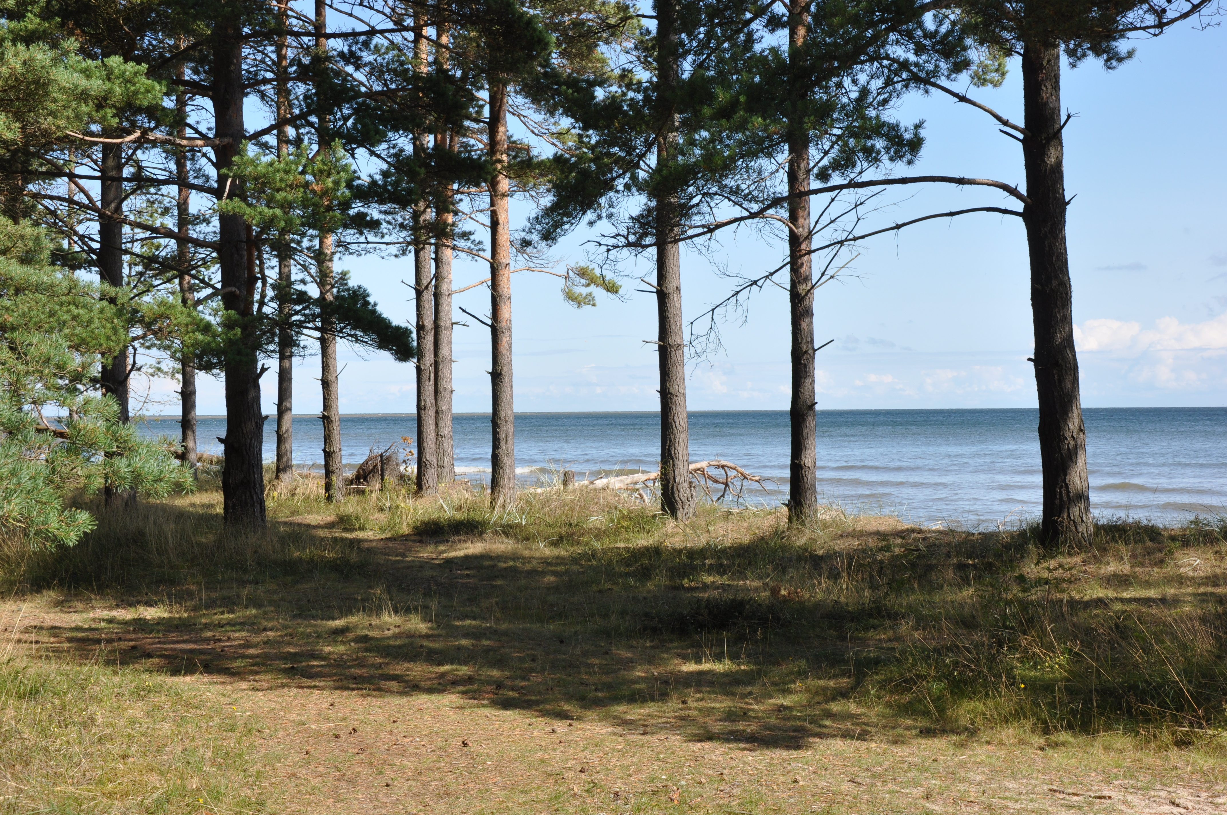 Kolkas pagasts, Dundagas novads, Latvia